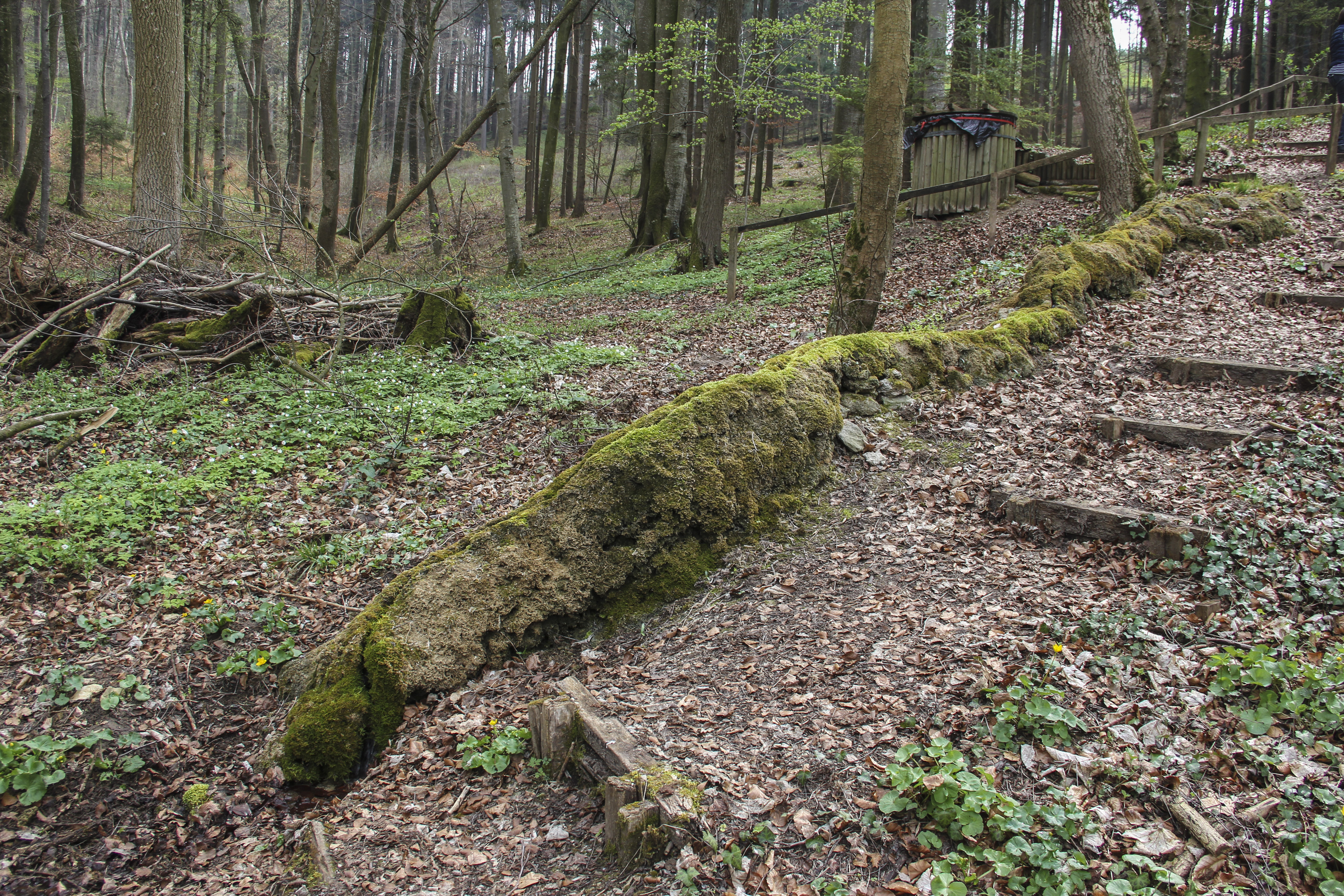 Steinerne Rinne, Hechlingen, Gesamtansicht